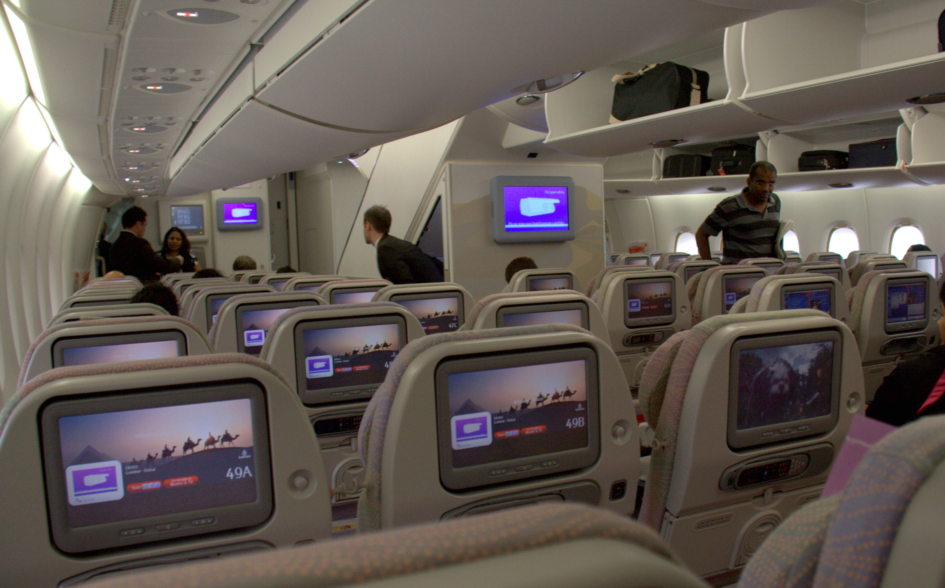 എമിറേറ്റ്സ് എയർ ബസ് എ 380 ഉൾ‌വശം